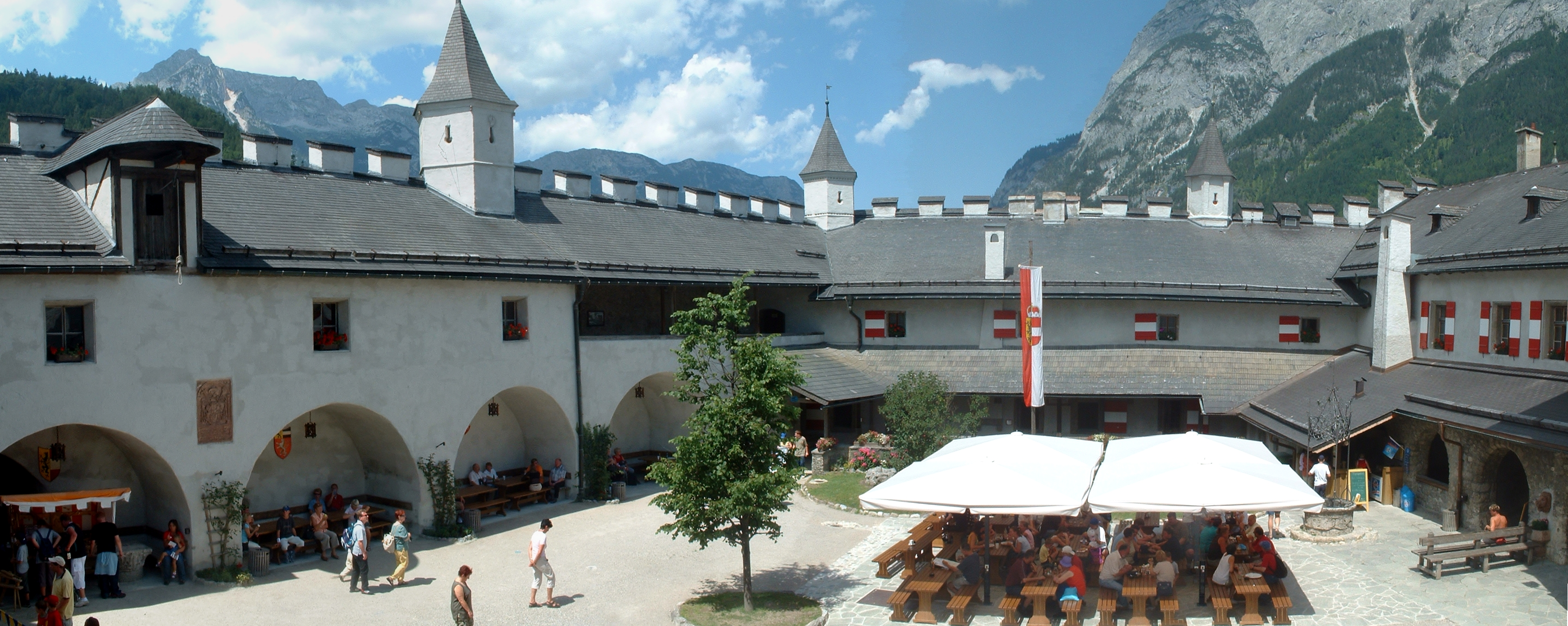 Der Innenhof der Burg Hohenwerfen im Salzburger Land.